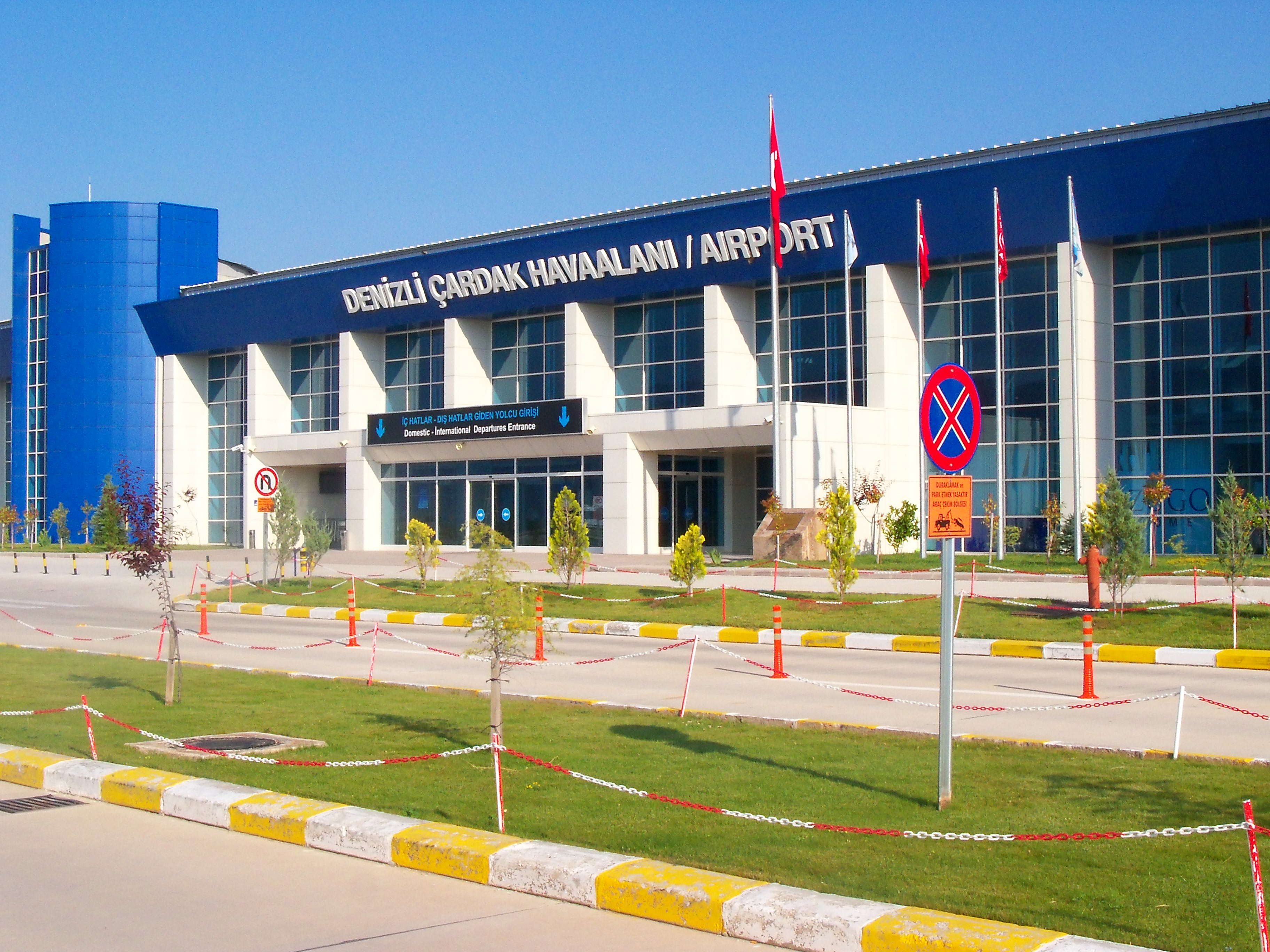 Çardak havalimanı